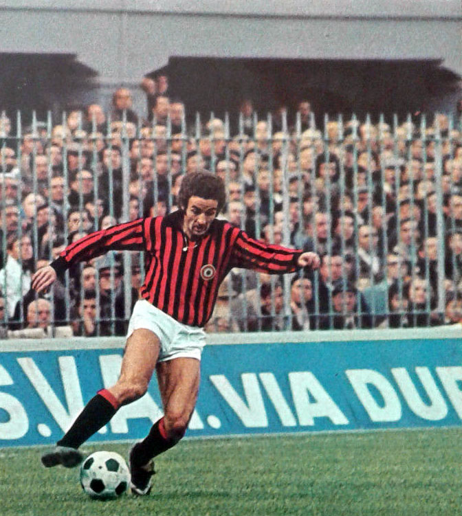 Il calciatore italiano Luciano Chiarugi in azione al Milan, allo stadio San Siro di Milano, nella stagione 1972-73.